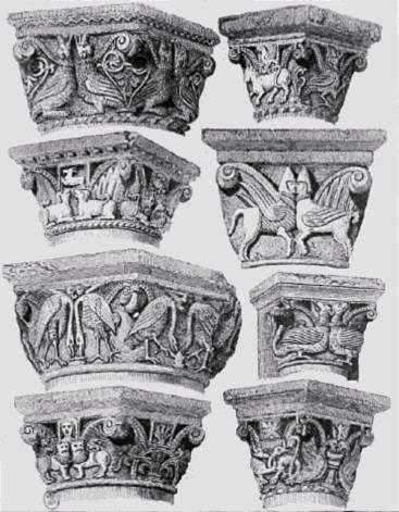 Dessin des chapiteaux du chœur de l'église abbatiale de la Trinité à Caen (Calvados)